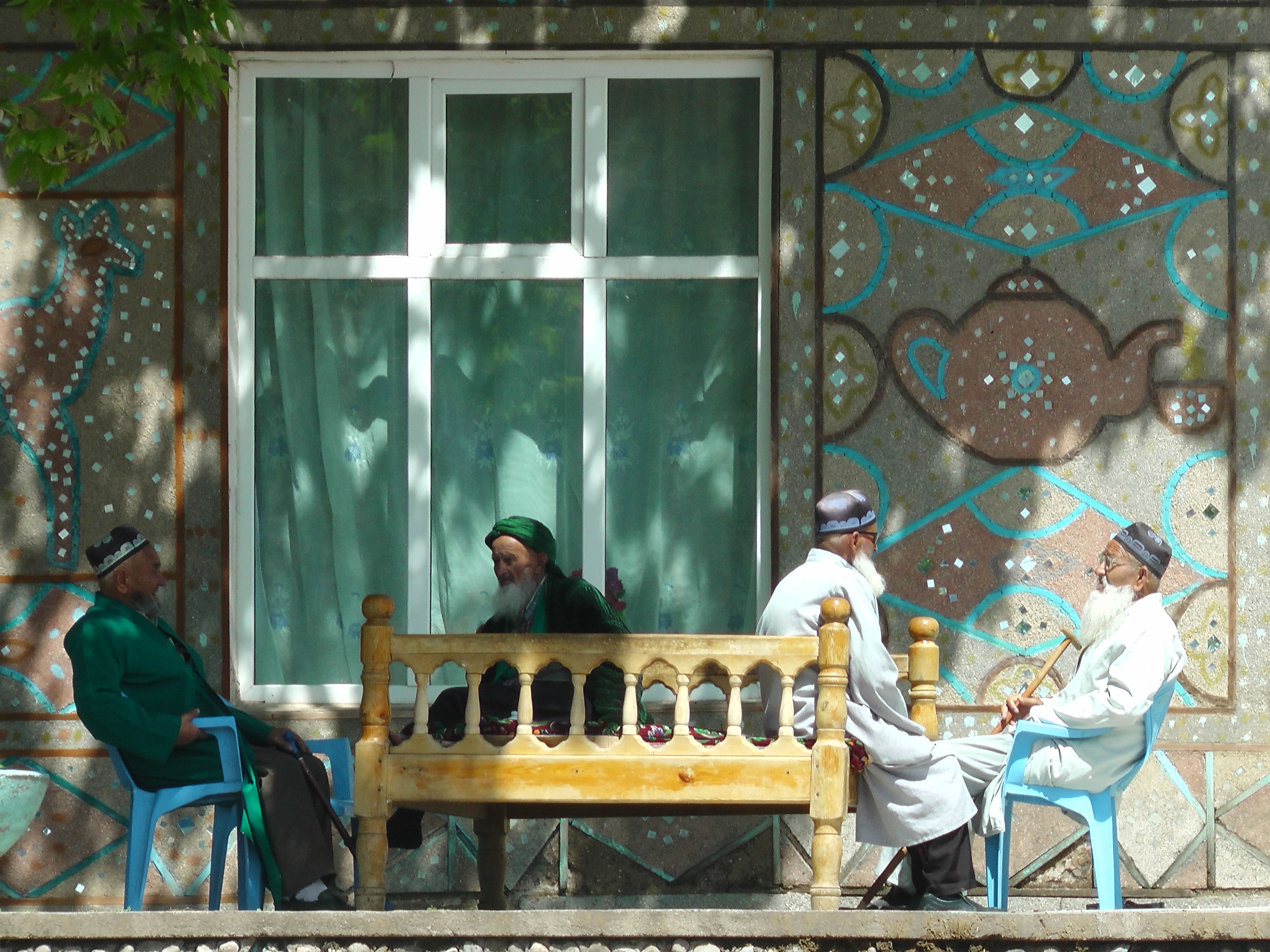 Тоҷикӣ: Суҳбати мӯйсафедон. Чойхонаи ноҳияи Файзобод